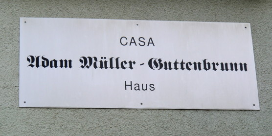 AMG-Hausplakette